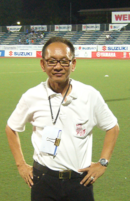 Arjhan Srong-ngamsub